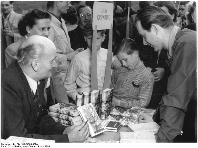 Zentralbild Quasch 1.5.1954 Am Nachmittag des 1. Mai 1954 fand in der Karl-Marx-Allee, Berlin, in und vor der Karl-Marx-Buchhandlung ein Schriftsteller-Basar statt. UBz: Der Schriftsteller Karl Grünberg unterhält sich mit Lesern